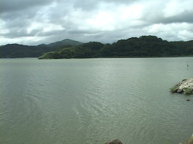 Tsudsurao castle,Tottori-city